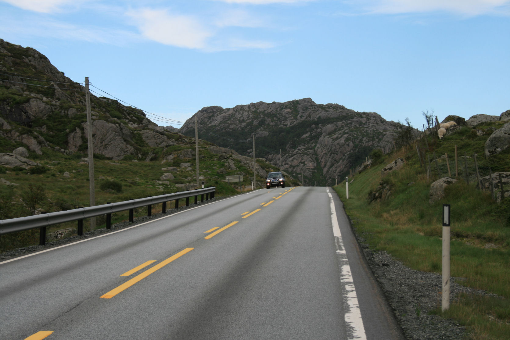 Runaskaret